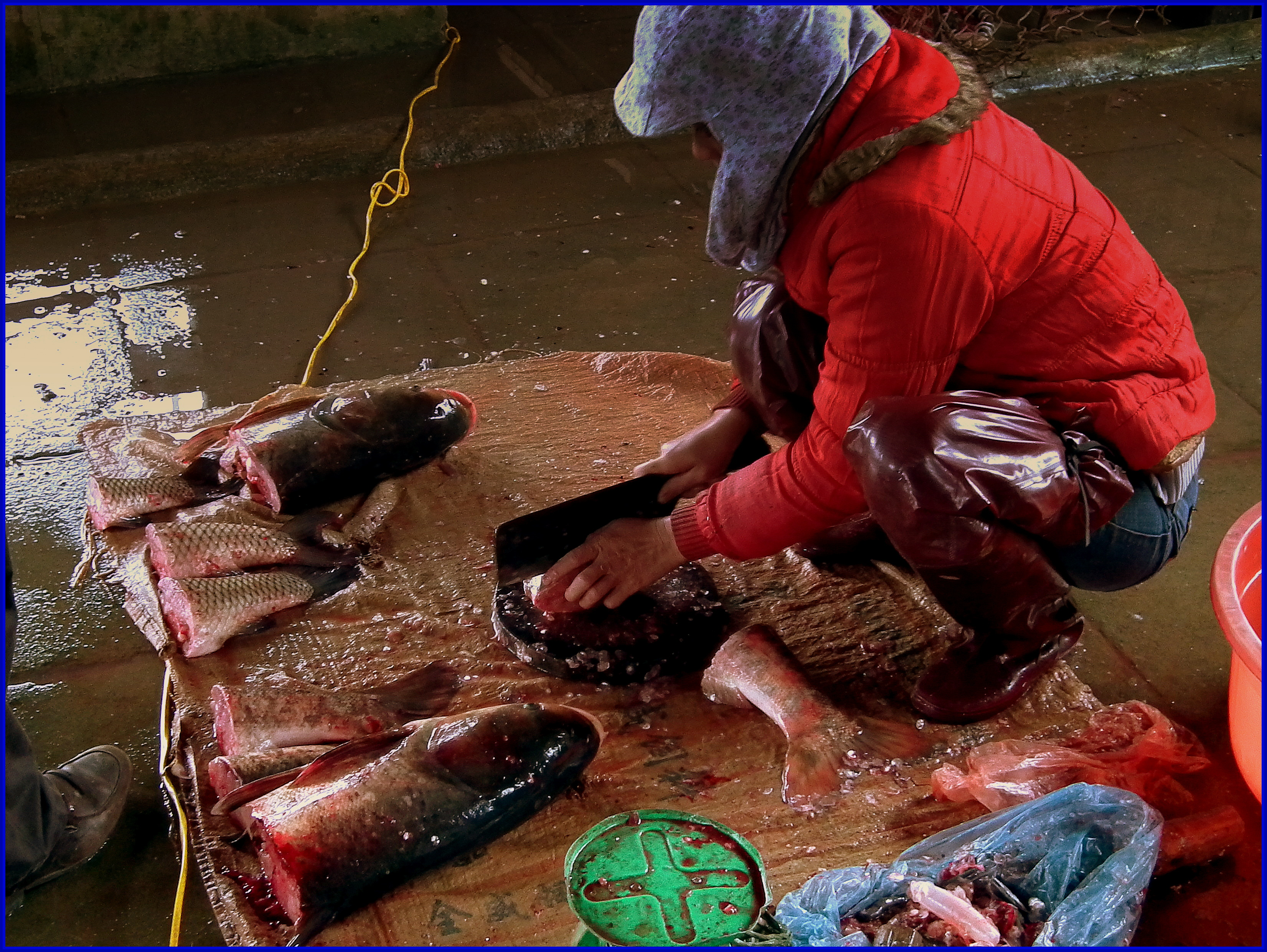 BAHA MARKET NORTHERN VIETNAM FEB 2012